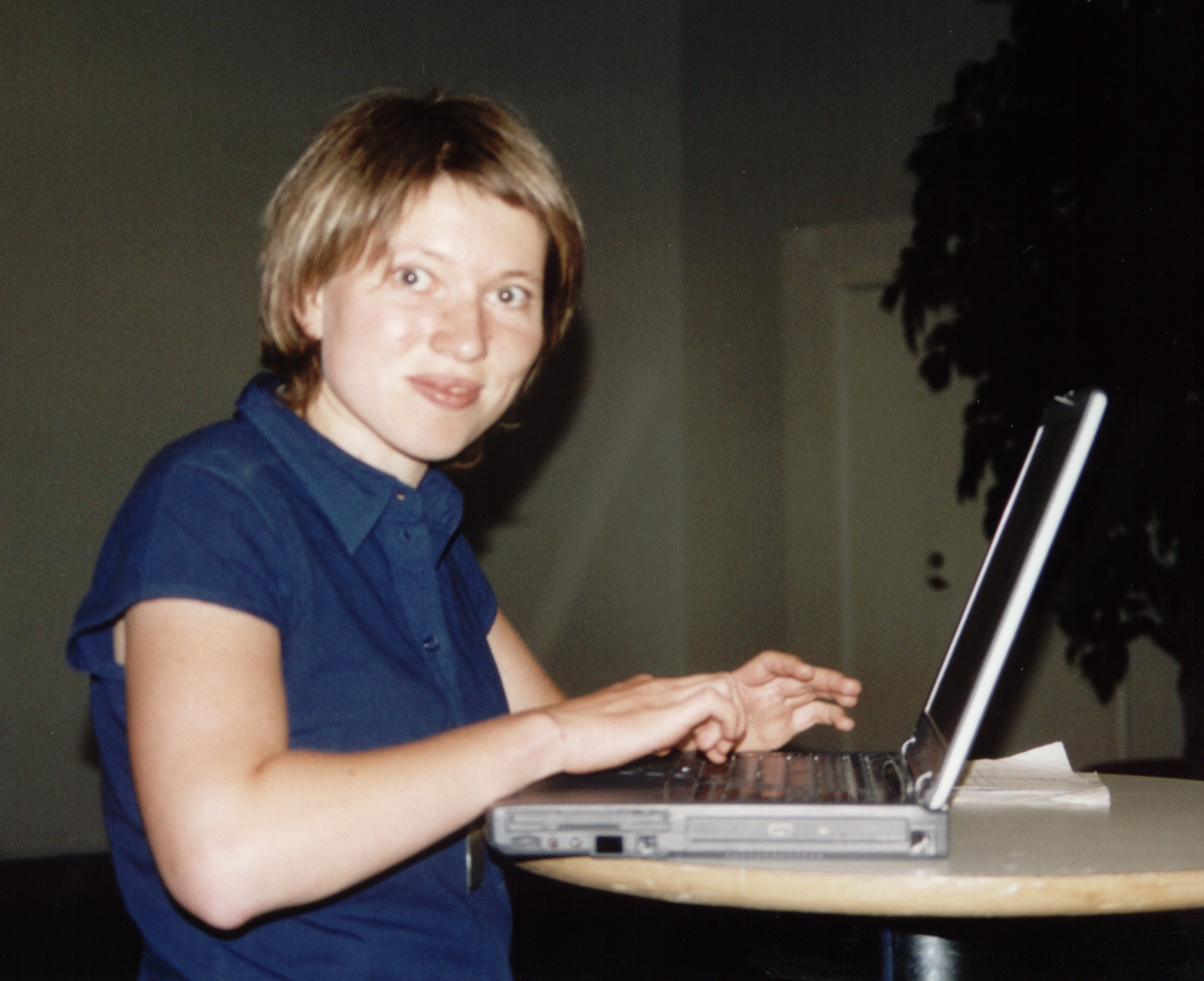 Universala Kongreso de Esperanto, Gotenburgo 2003. TEJO-kasistino Katja Ignatieva.